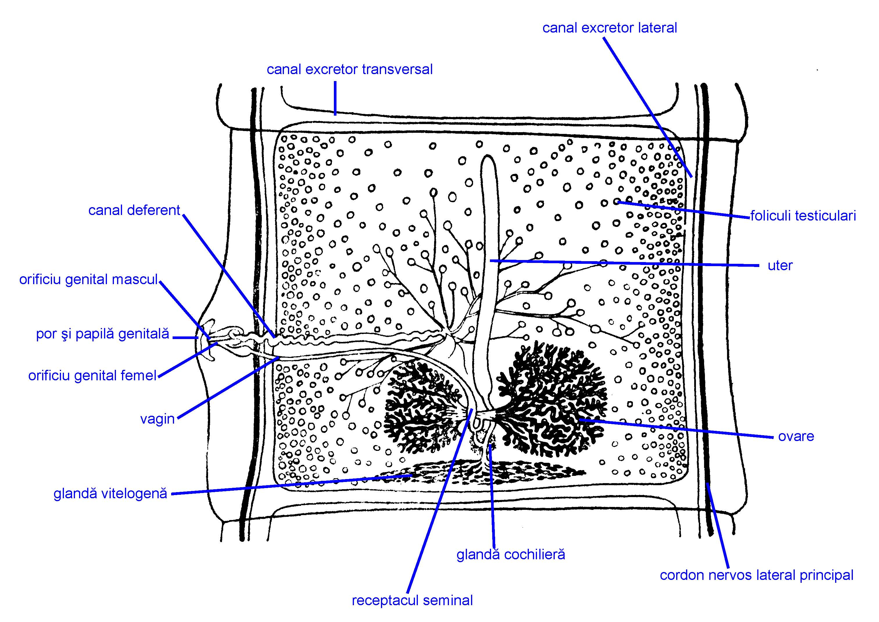 An proglottid of Taenia solium